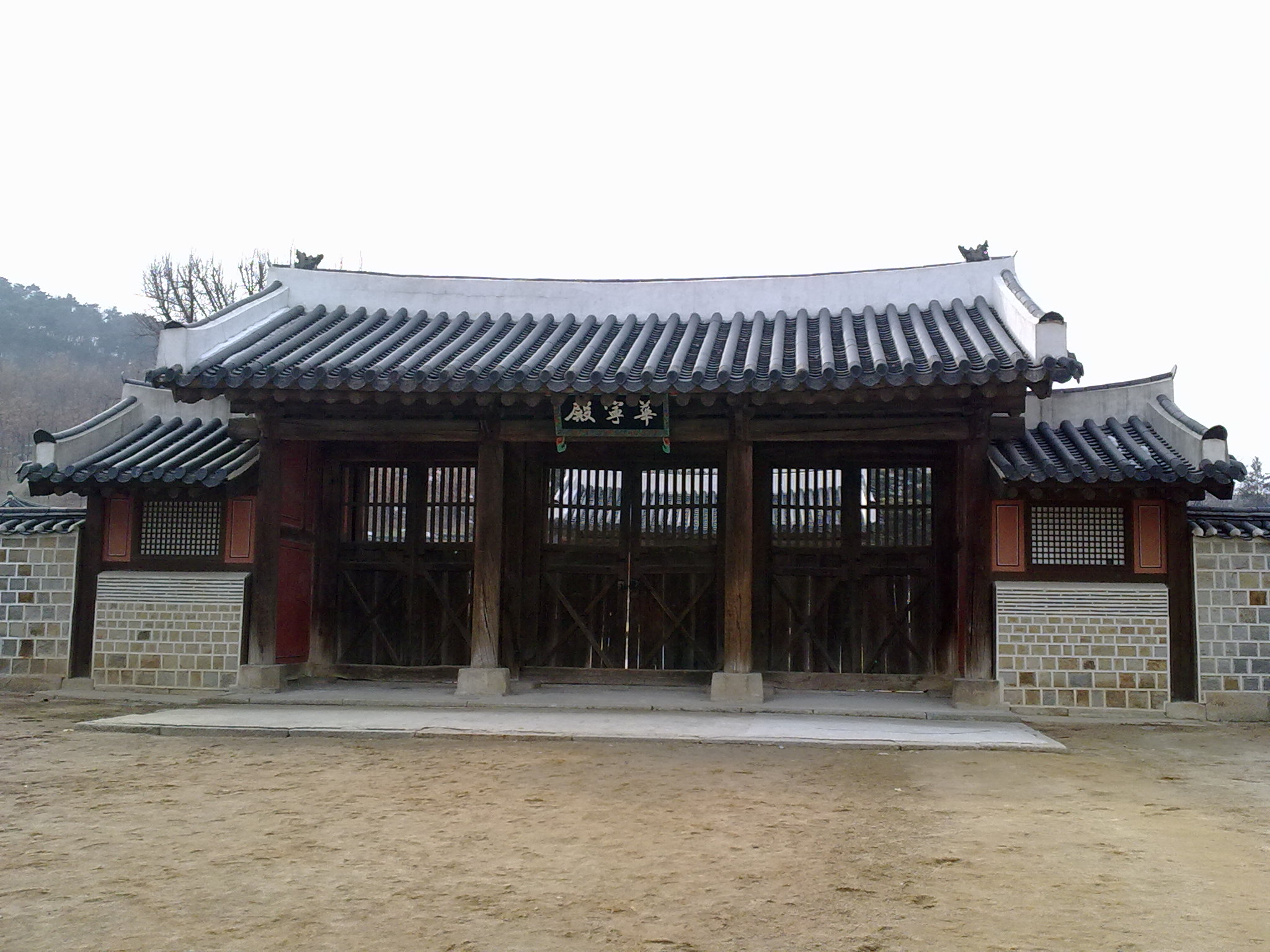 화령전 외삼문 전경